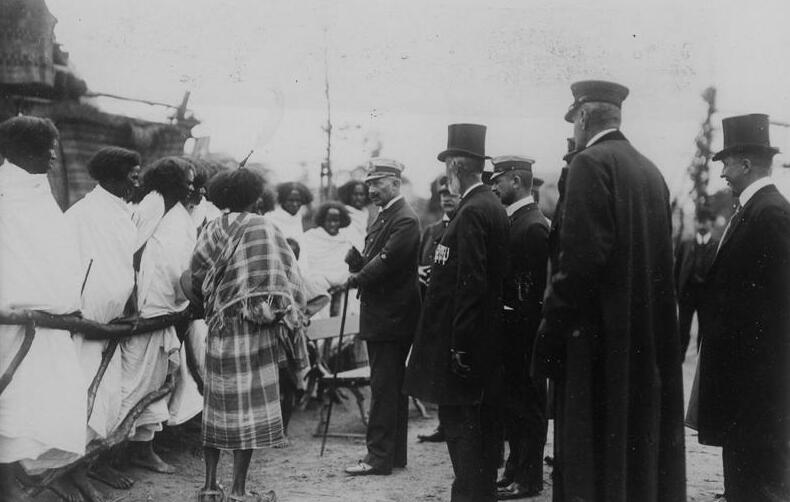 Hamburg, Kaiser Wilhelm II. im Tierpark Hagenbeck 1909. Kaiser Wilhelm II. im Gespräch mit den Aethiopiern bei Carl Hagenbeck in Hamburg. 12183-09 [Äthiopier im Tierpark Hagenbeck] Abgebildete Personen: Wilhelm II.: Deutsches Reich, Kaiser, II., Deutschland Hagenbeck, Karl: Gründer des Tierparks in Stellingen bei Hamburg, Deutschland (GND 118700502)